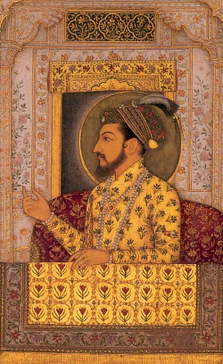 Shah Jahan of Mughal empire.